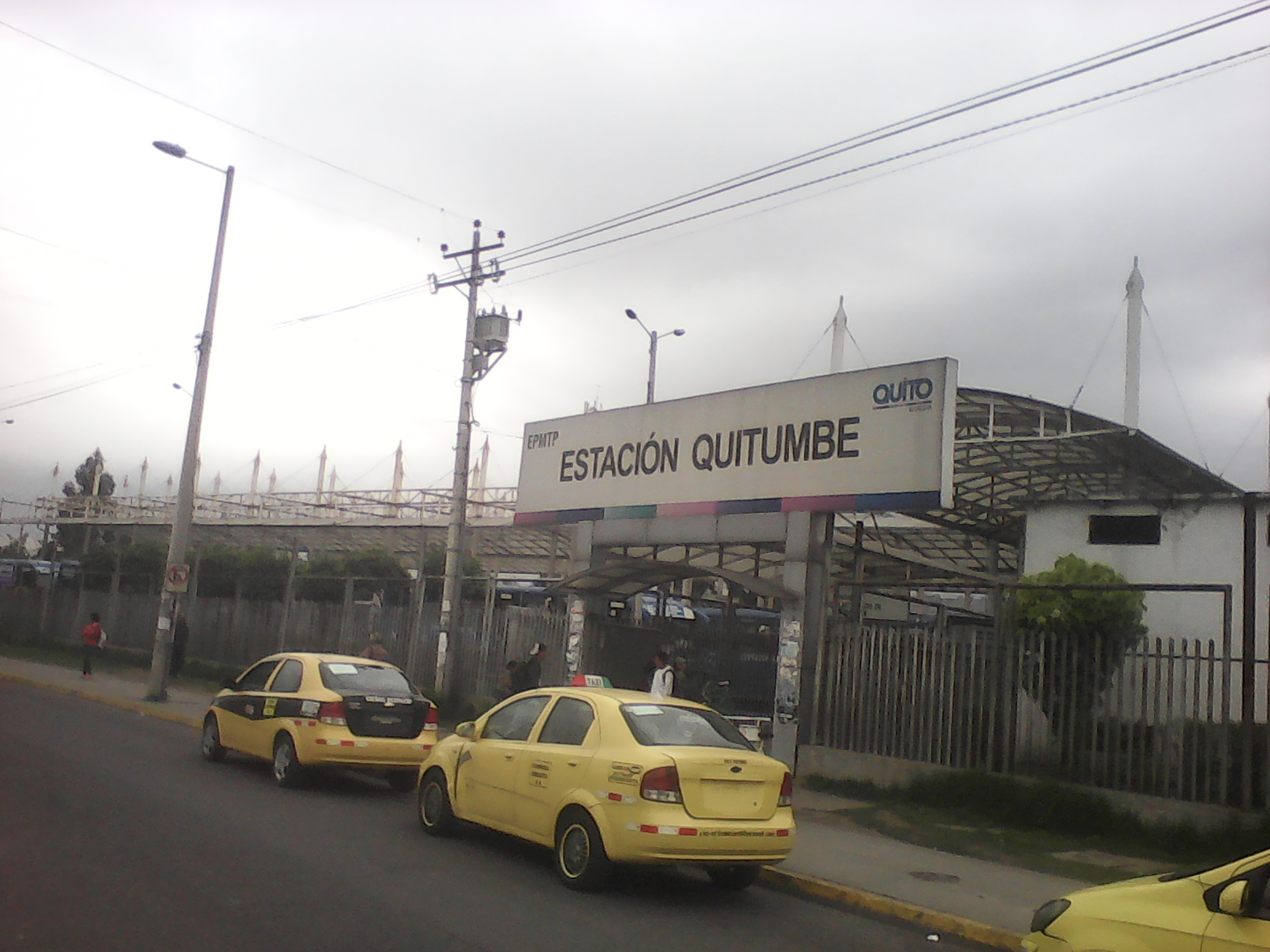 Estación Quitumbe